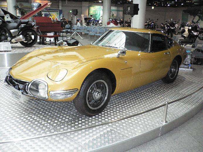 ヤマハ本社にて撮影したもの